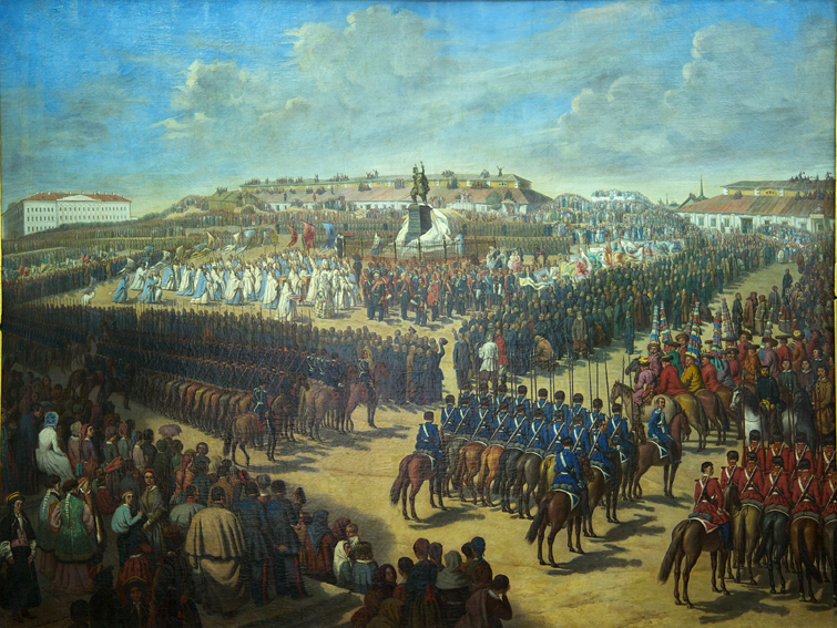 Карл Мазер (1807—1884) Картина Новочеркасск Открытие памятника Платову